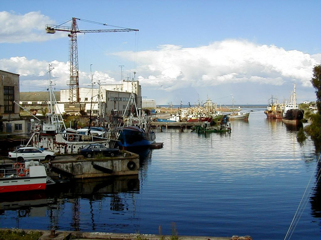 Rojas osta 1999-07-17